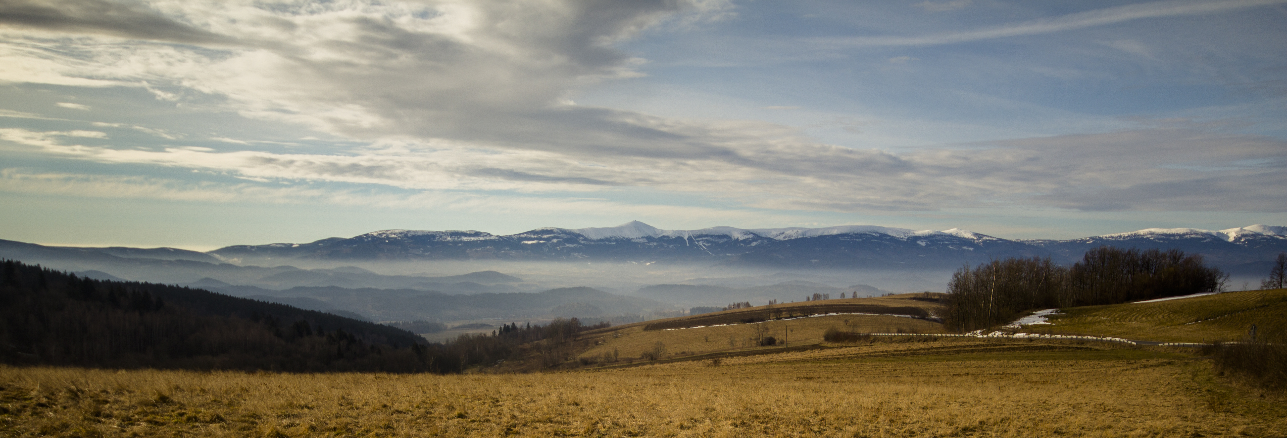 Widok z Gór Kaczawskich na Sudety. This is a photography of Natura 2000 protected area with ID PLH020037